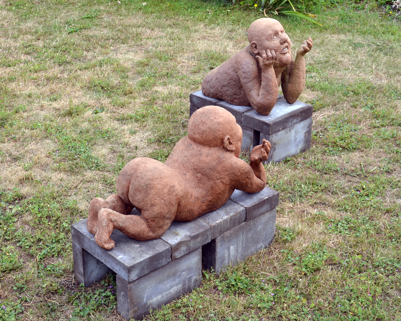 Hana Purkrábková, Bědující píďalkové 2013, Letní keramická plastika 2015